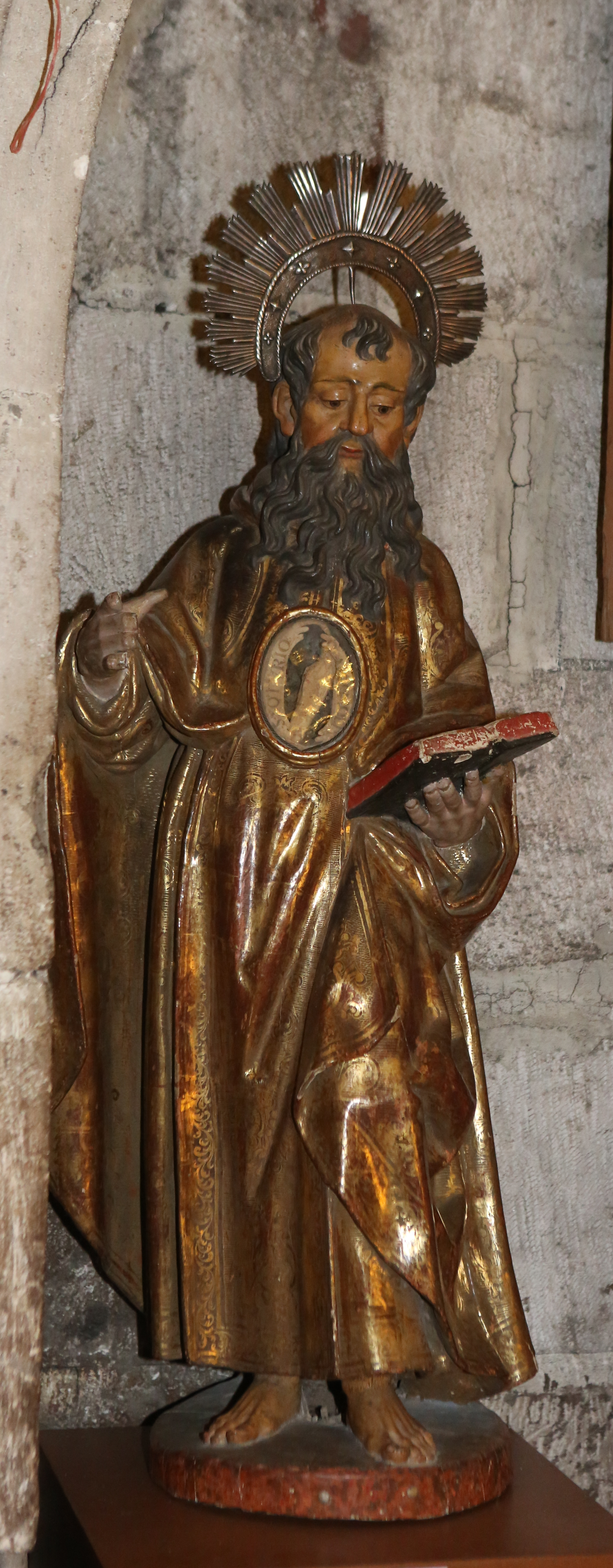 La imagen de San Saturio, patrón de Soria, es una buena talla de 0,93metros del siglo XVII. Su cabeza es la clásica en toda la imagenería del santo, con su flequillo y sus luengas barbas. Su veste de anacoreta y su capa, bellamente policromadas. La actitud de sus manos con el libro abierto indica la tarea evangelizadora y apologética a la que se dedicó el santo, entre las gentes de los pueblos comarcanos. También clásico en sus imágenes es el relicario incrustado en el pecho, en cuyo alrededor puede leerse:«San Saturio, ora pro nobis».